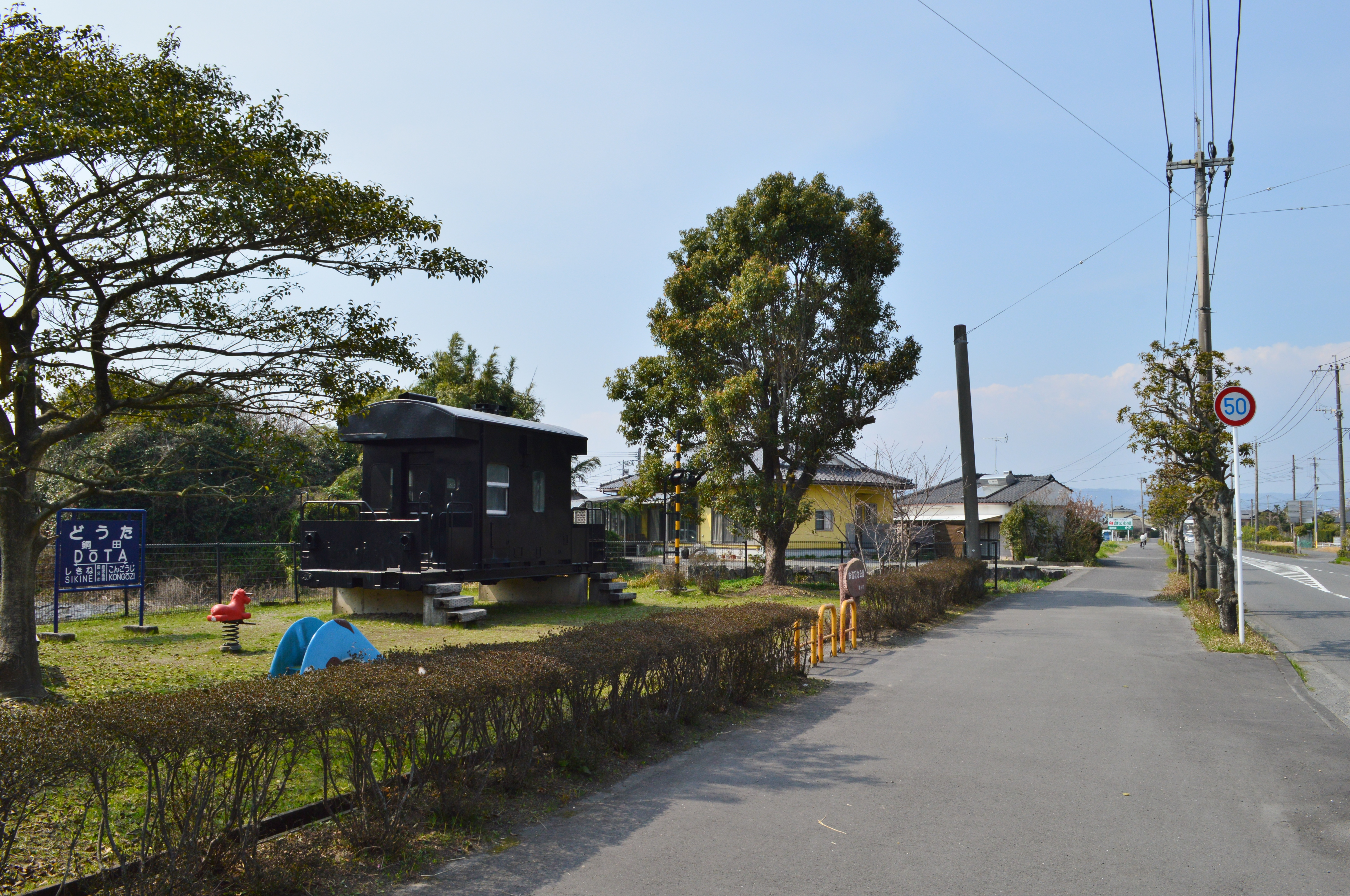 銅田駅跡鉄道記念公園と廃線敷